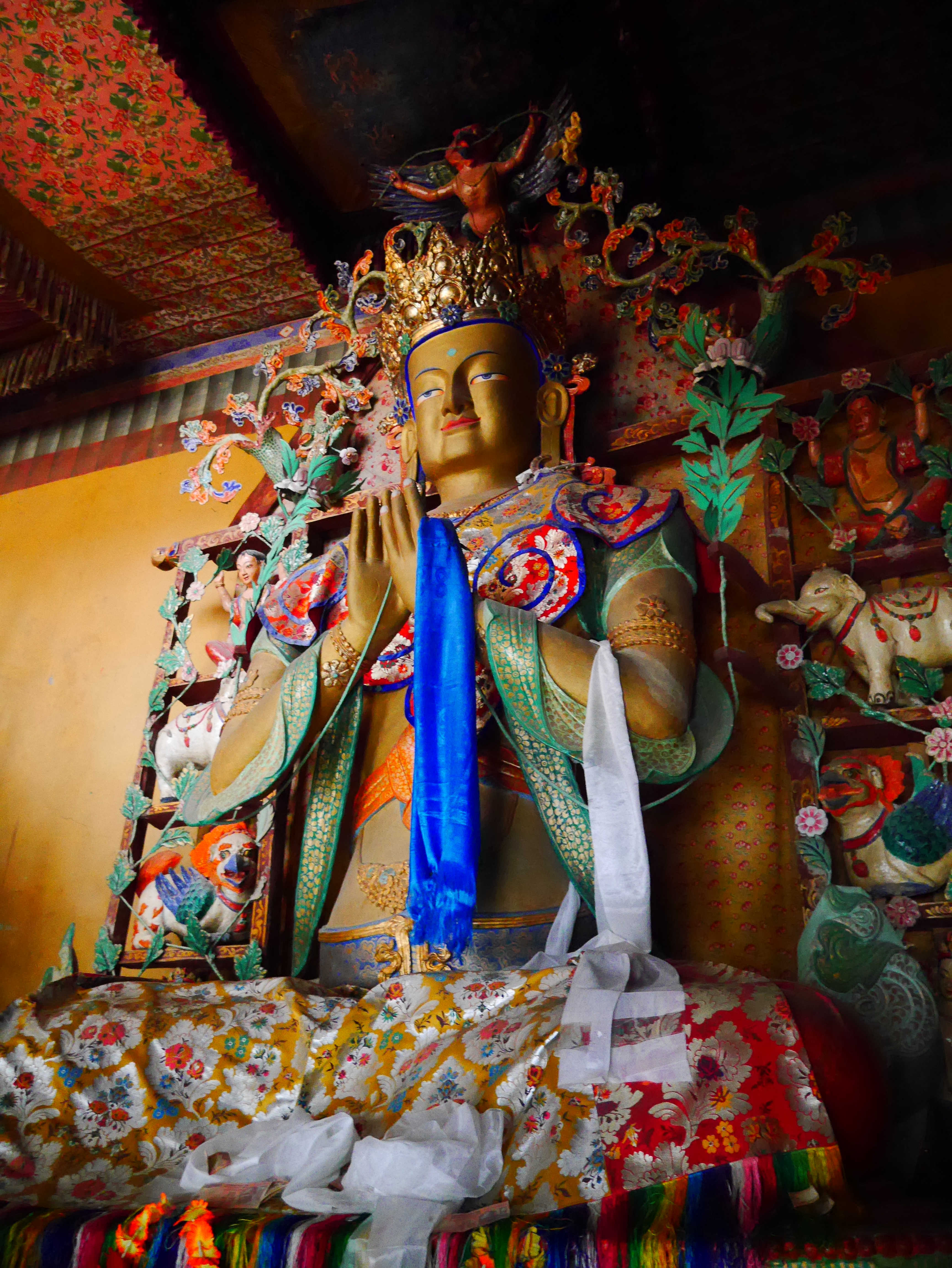 Monastère de Rizong : statue de Maitreya ou Bouddha du futur. Selon la tradition bouddhique, 1ère de la Loi bouddhique se divise en trois stages : une première période de cinq cents ans, de mise en branle de la roue de la Loi, une seconde période de mille ans, de détérioration de la Loi (appelée Mappô au Japon) ; enfin une troisième période de trois mille ans après laquelle, le bouddhisme ayant disparu, un nouveau Bouddha apparaîtra qui remettra en branle la roue de la Loi. Ce futur Bouddha est encore dans le ciel Tushita, à l’état de Boddhisattva. Ce serait le Bouddha Gautama qui l’aurait Lui-même intronisé comme Son successeur. Il est « le Bienveillant » et vit présentement sa dernière existence de Boddhisattva. Anticipant sur sa prochaine venue, on le considère parfois comme un Bouddha et on lui donne le titre de Tathâgata.